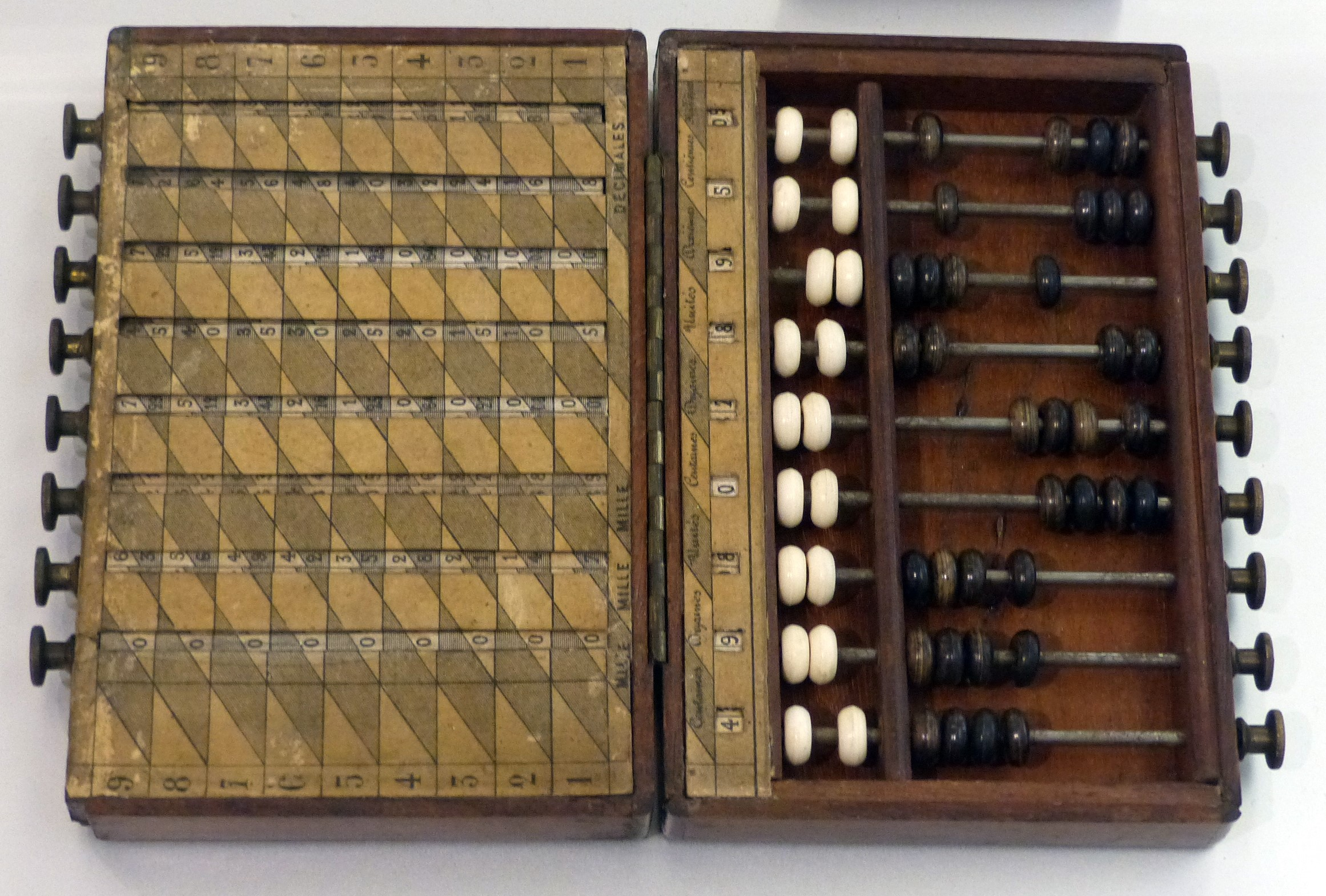 Napiersche Rechenstäbe mit Abakus, 19. Jahrhundert, Frankreich; Exponat im Technischen Museum Wien